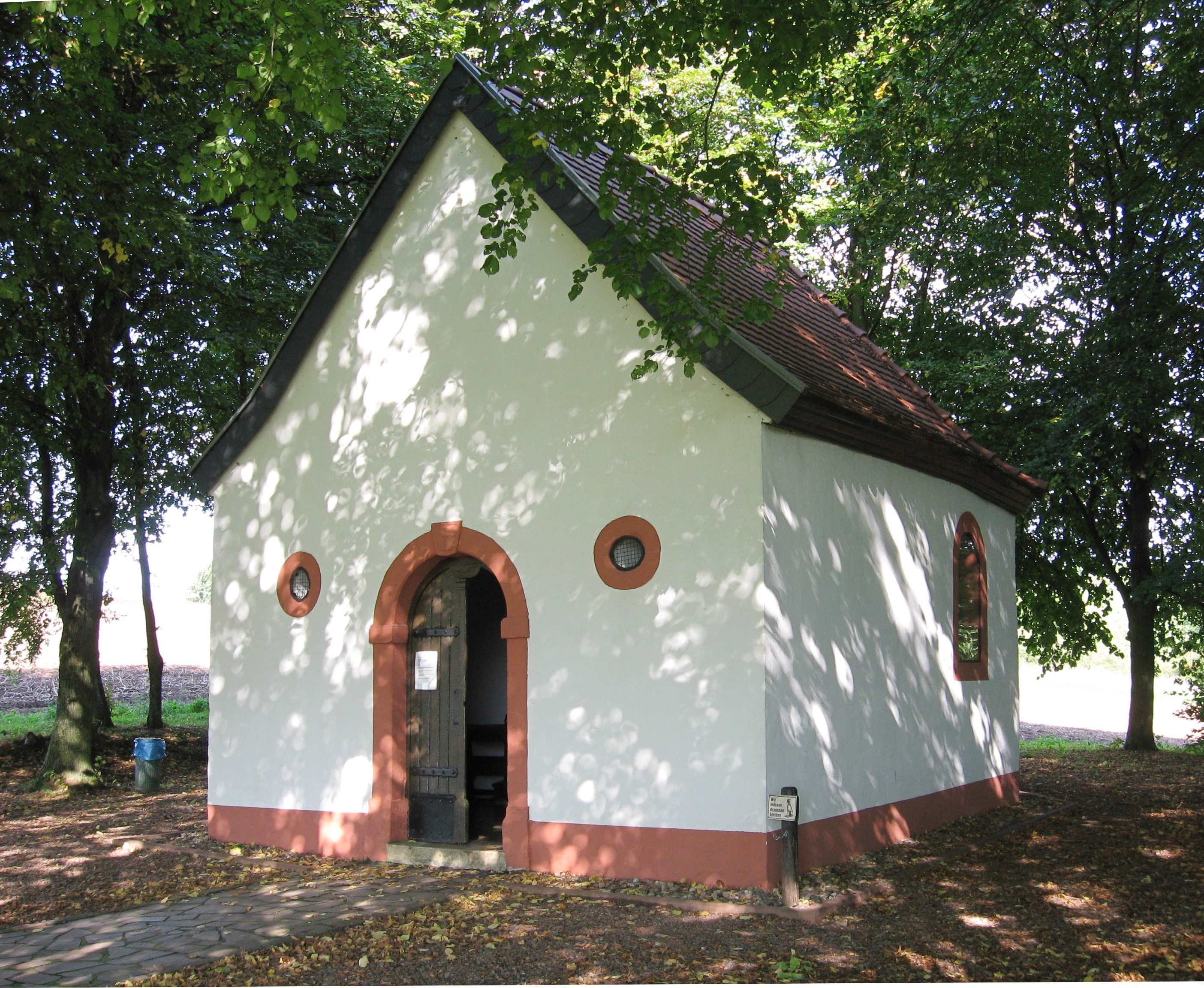 Valelentinuskapelle (Wallenbornkapelle) aus dem 18. Jahrhundert bei Wiesbach (Saar)